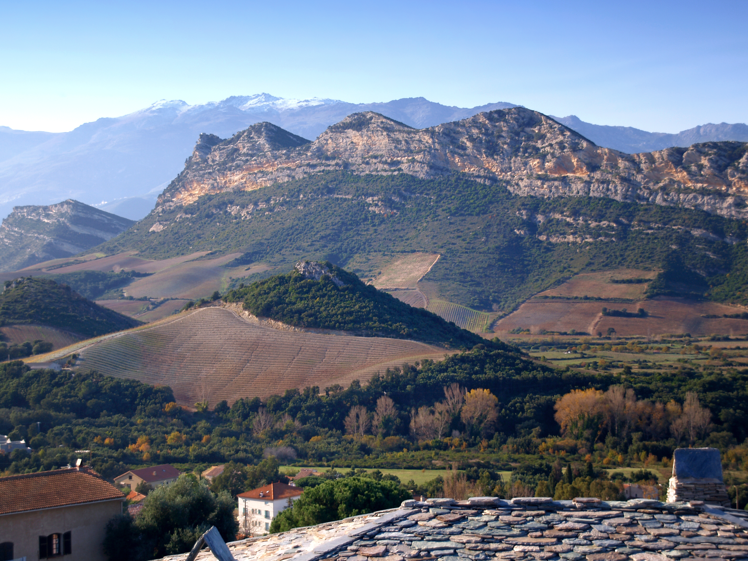 Barbaggio (Corse) - Collines du Monte Sant'Angelo, à cheval sur Poggio-d'Oletta et Saint-Florent